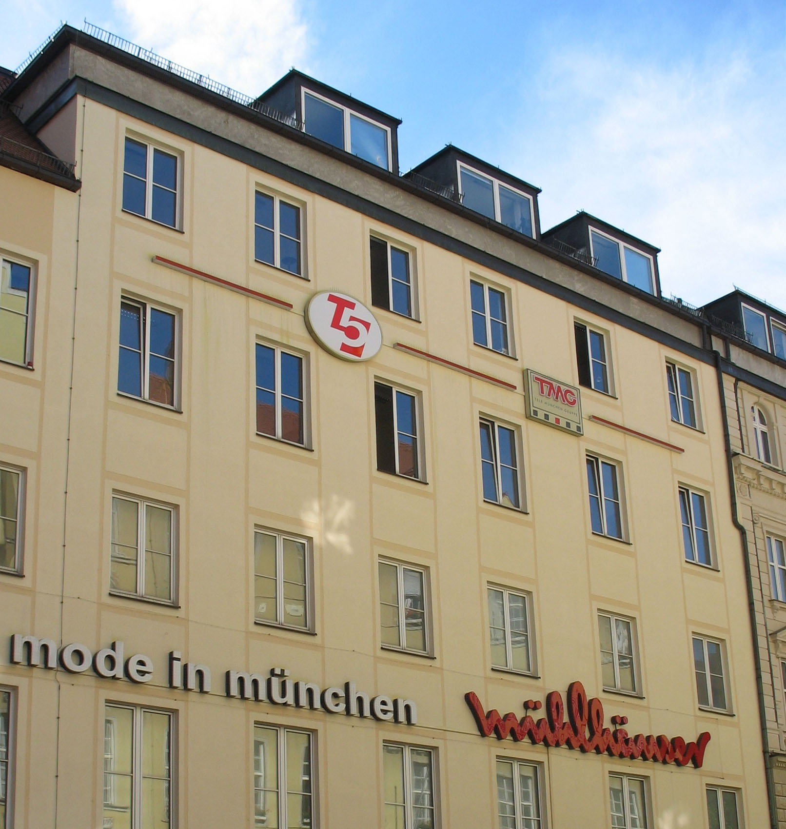 Informationen Beschreibung: Sitz der TMG in München Autor: Jcg2006 Aufnahmedatum: 15. Mai 2006 Quelle: selbst fotografiert